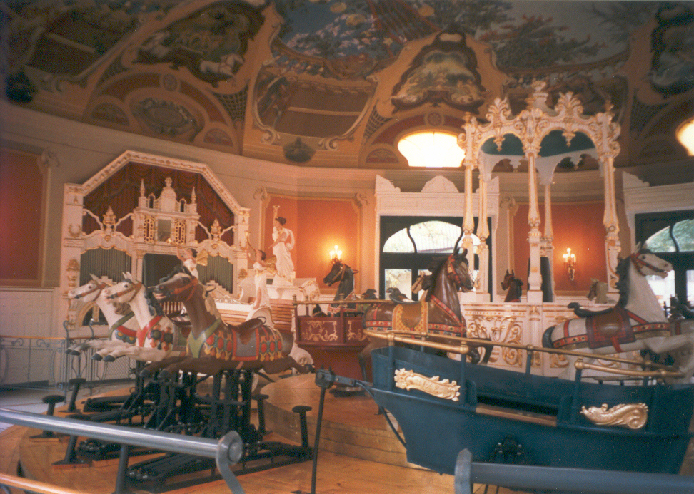 Kolotoč ve Vidám parku.